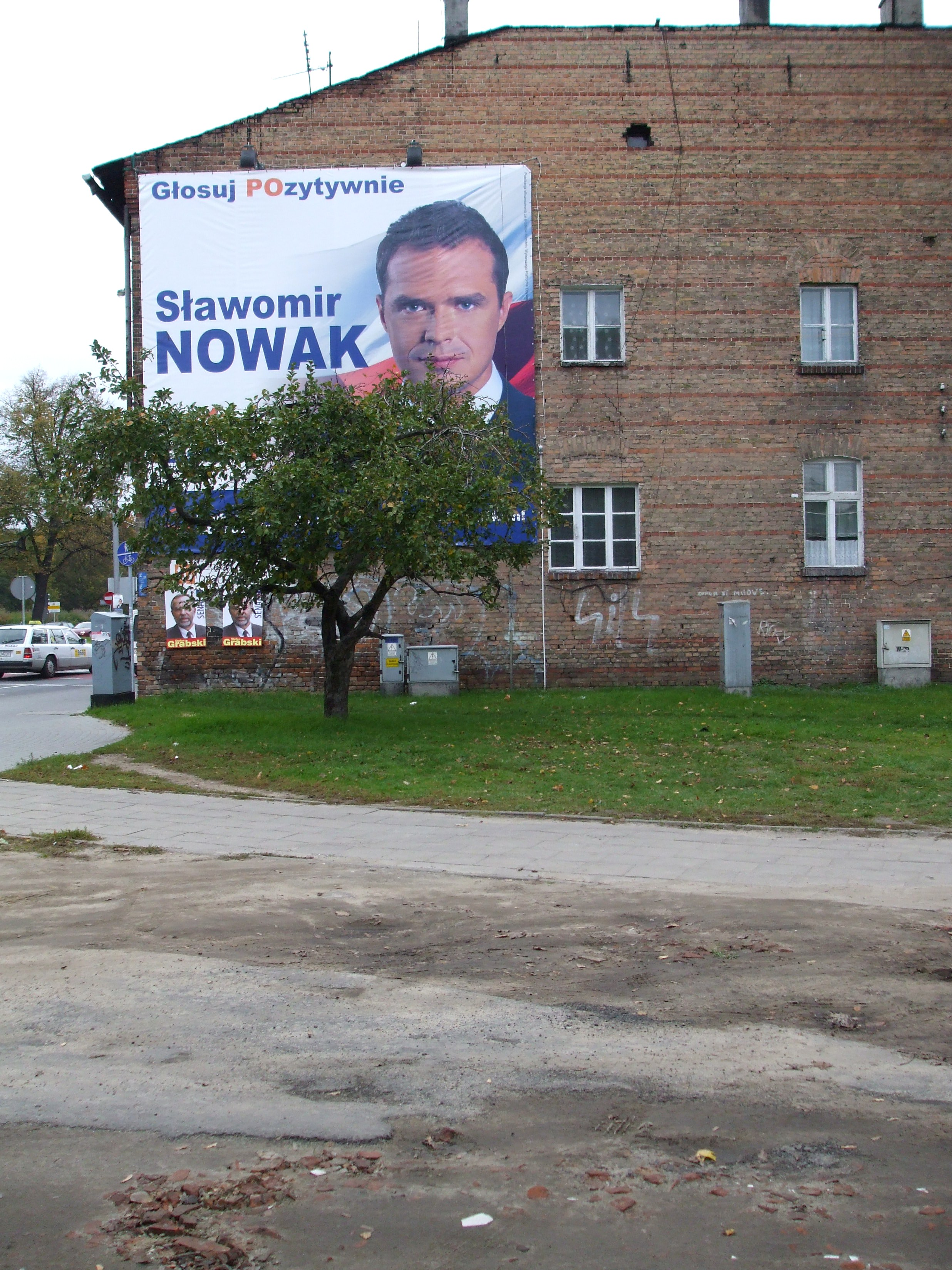 Gdańsk Oliwa, Aleja Grunwaldzka 535 / róg ul. Pomorskiej - budynek mieszkalny w zespole dawnej fabryki mydła, następnie zajezdni tramwajowej, 1870